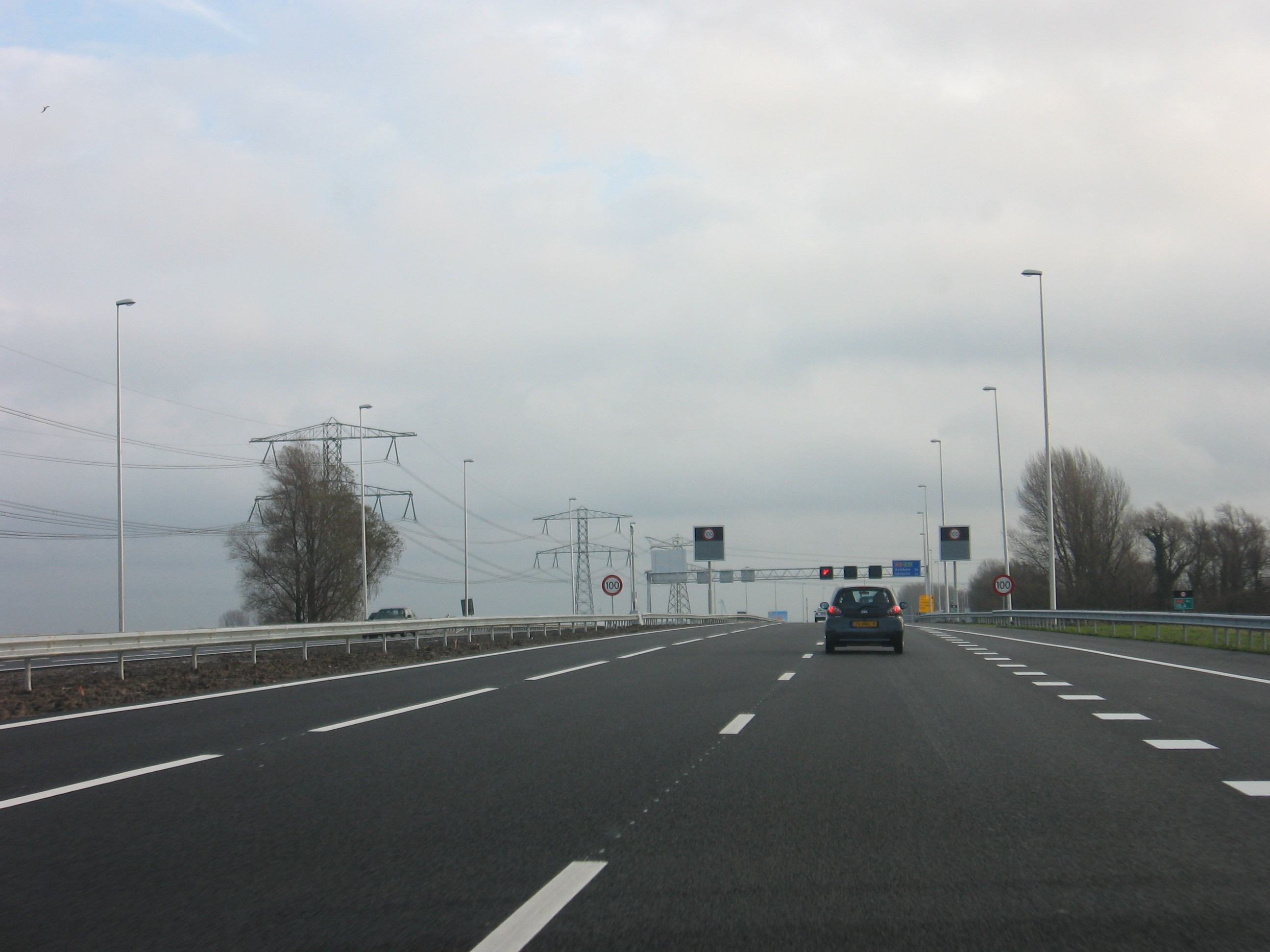 Spitsstrook (Plusstrook)